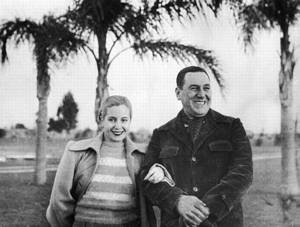 Juan Domingo Perón y Eva Duarte, en octubre de 1950